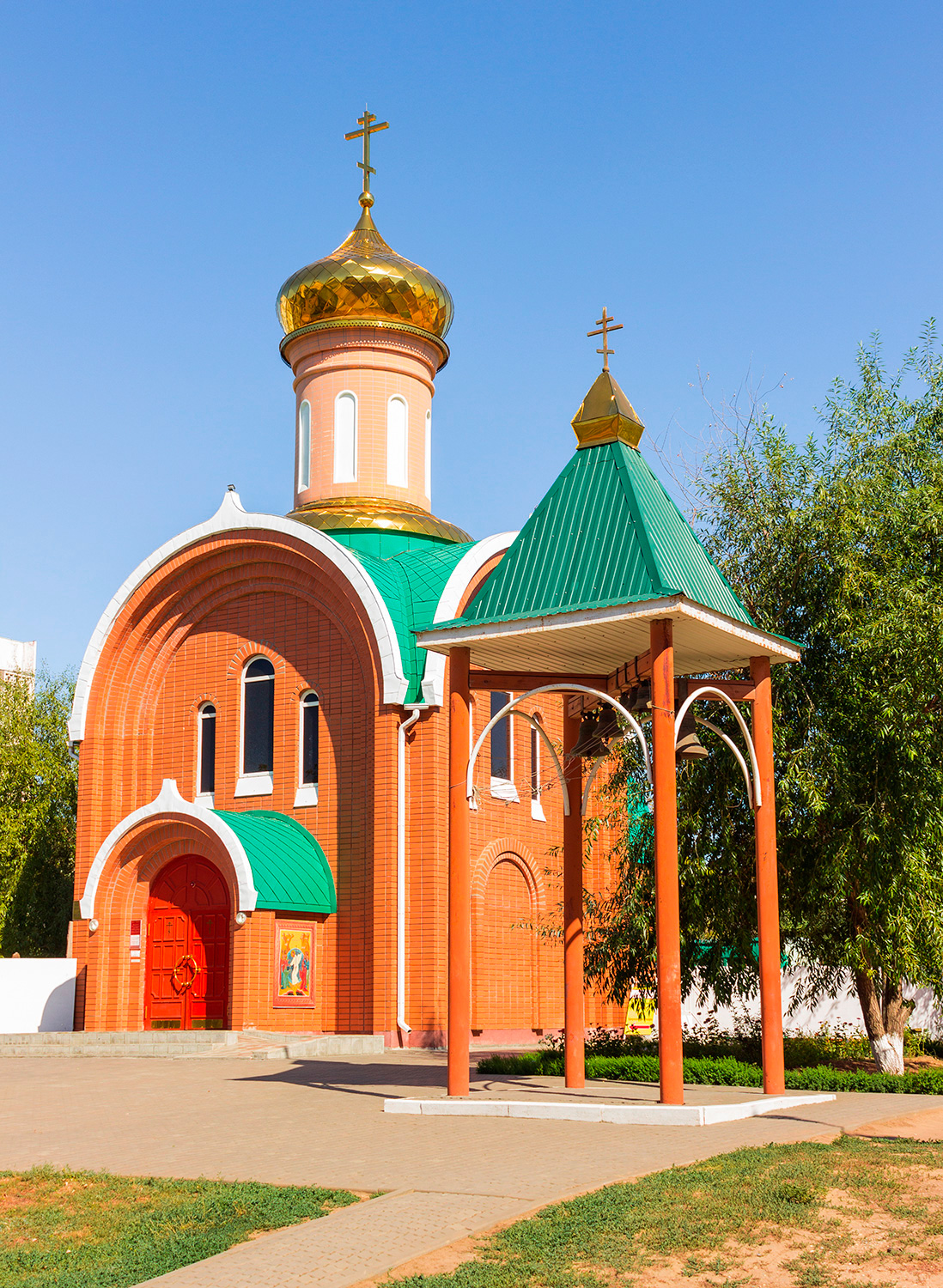 Храм Часовня Преподобного Сергия Радонежского в 2016 году